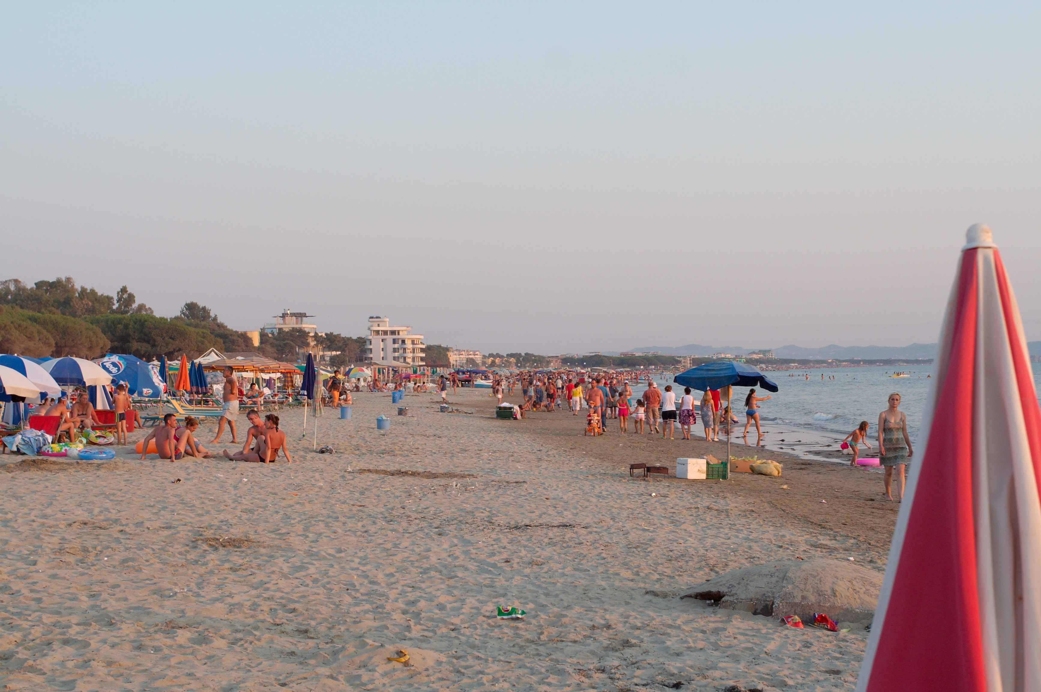 Sunset in Durrës, Albania